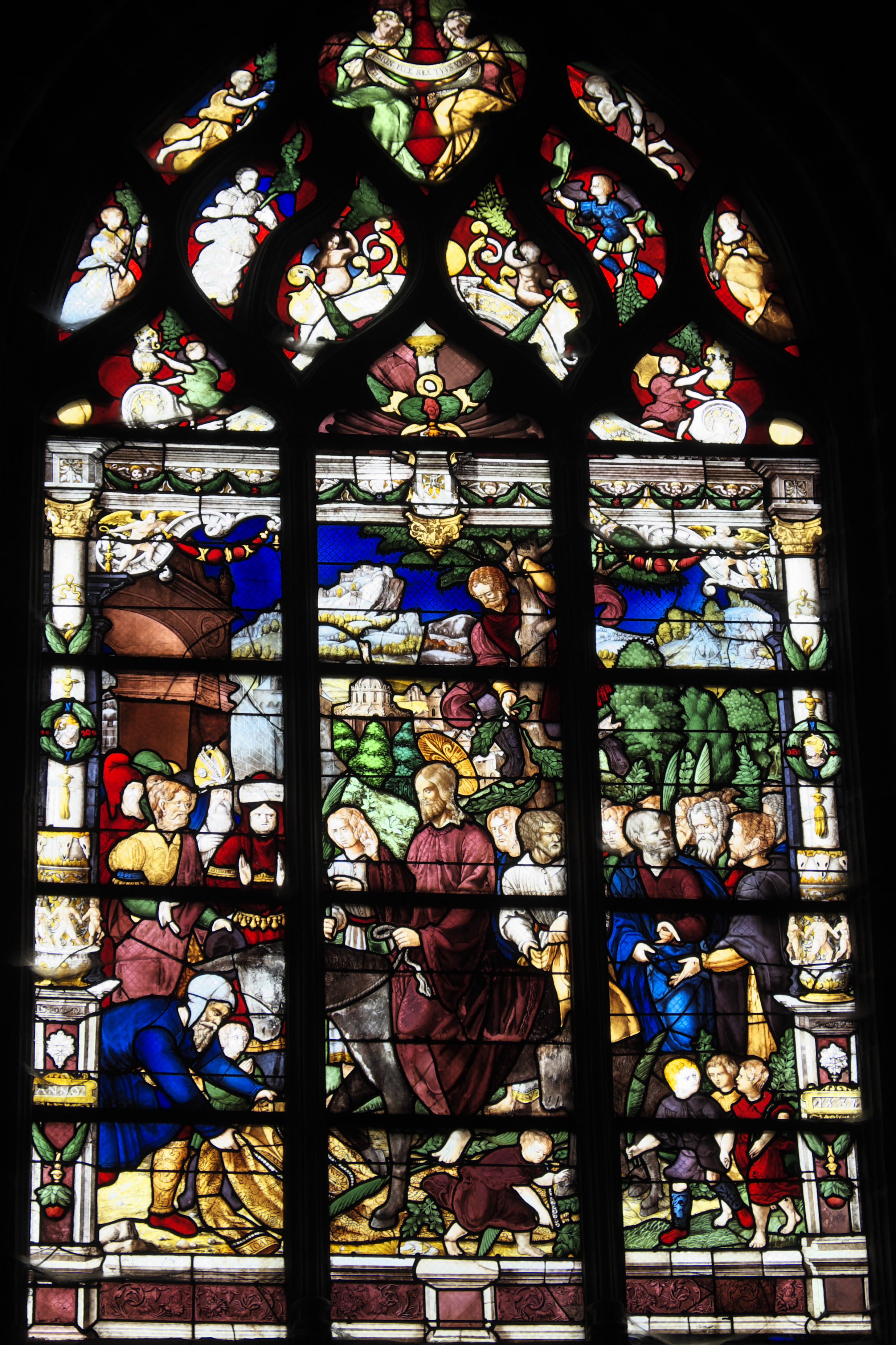 Katholische Pfarrkirche Notre-Dame in Vitré im Département Ille-et-Vilaine (Region Bretagne/Frankreich), Bleiglasfenster (baie 16) von 1537; Darstellung: Einzug in Jerusalem